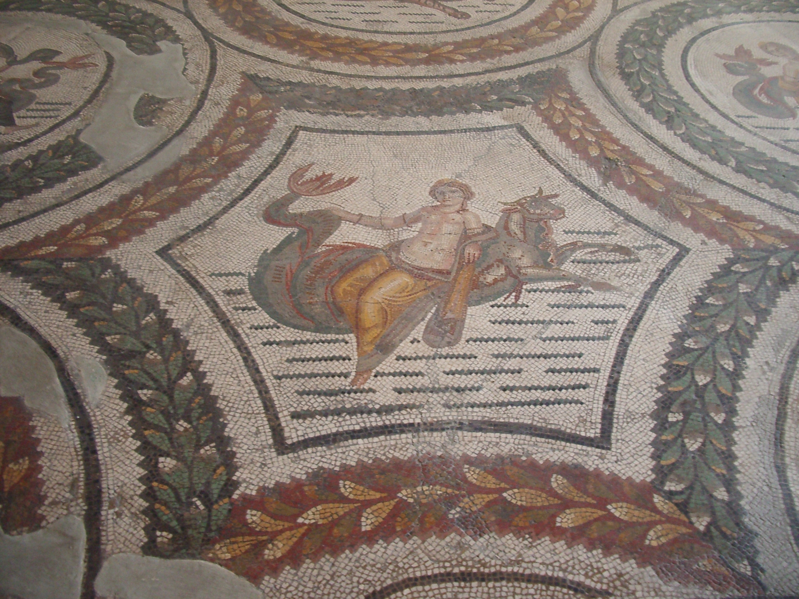 Nereide. Mosaic al Museu del Bardo - Tunis